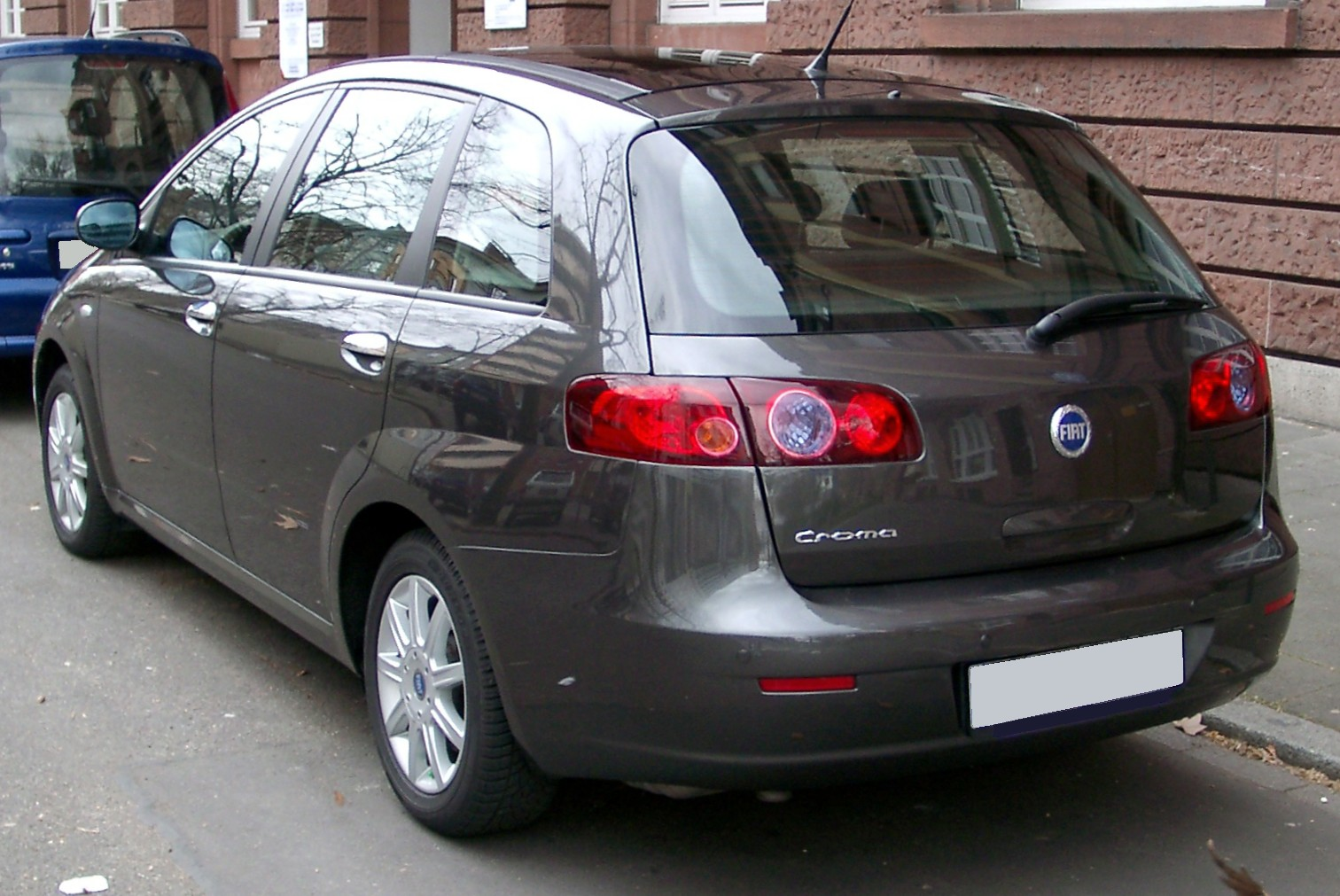 Fiat Croma (seit 2005)